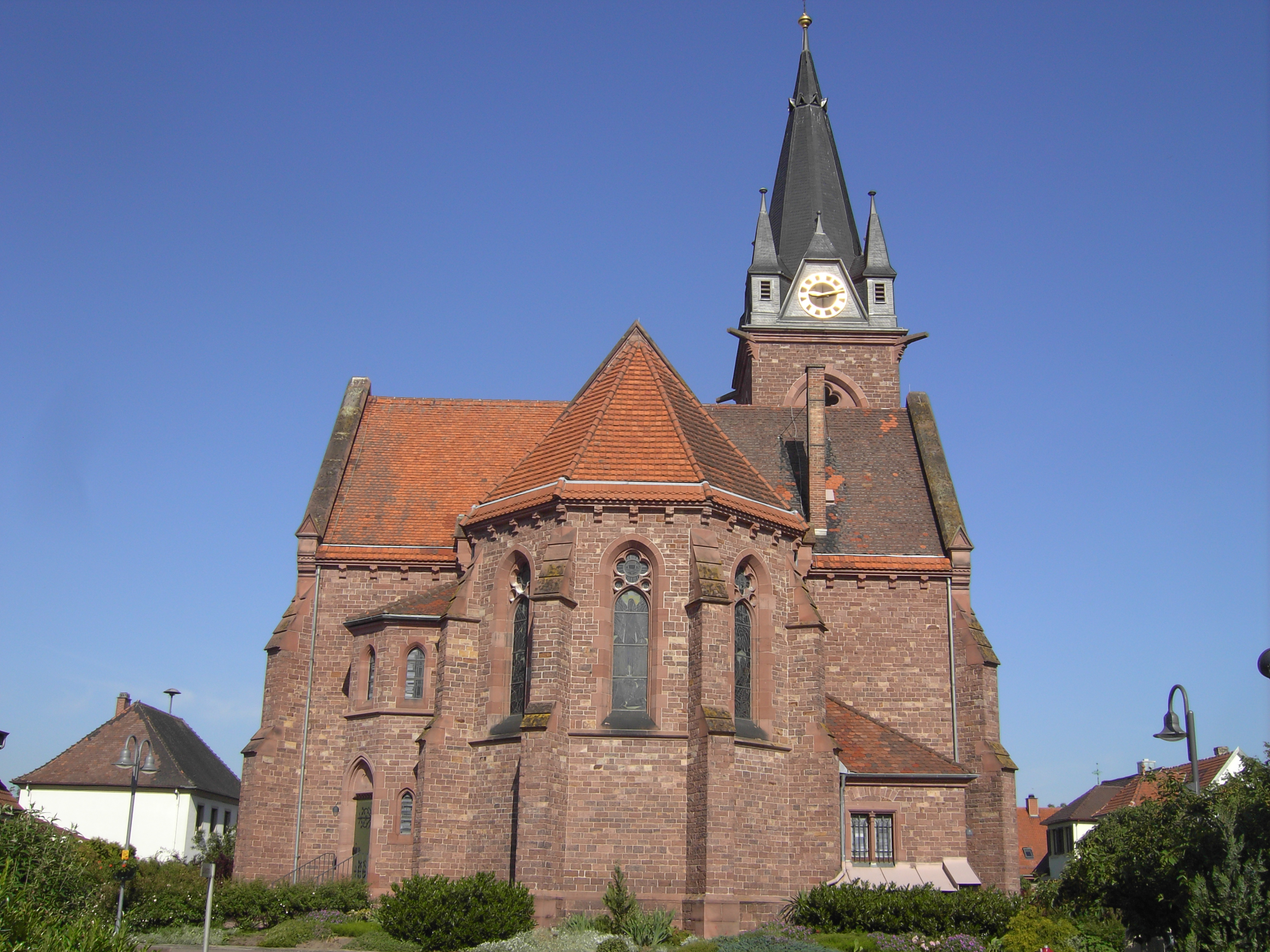 Stutensee-Staffort Evangelische Kirche/Protestant Church